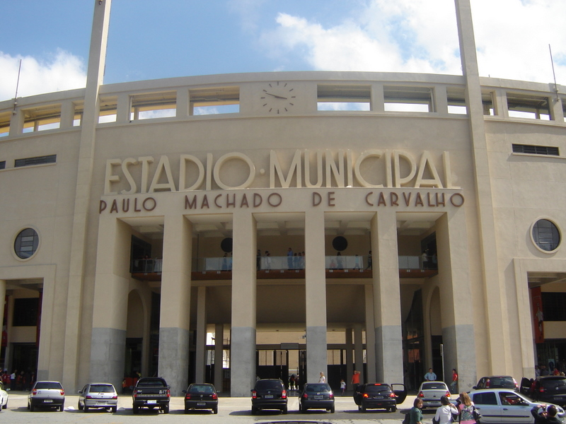 Fachada do estádio do Pacaembu em São Paulo